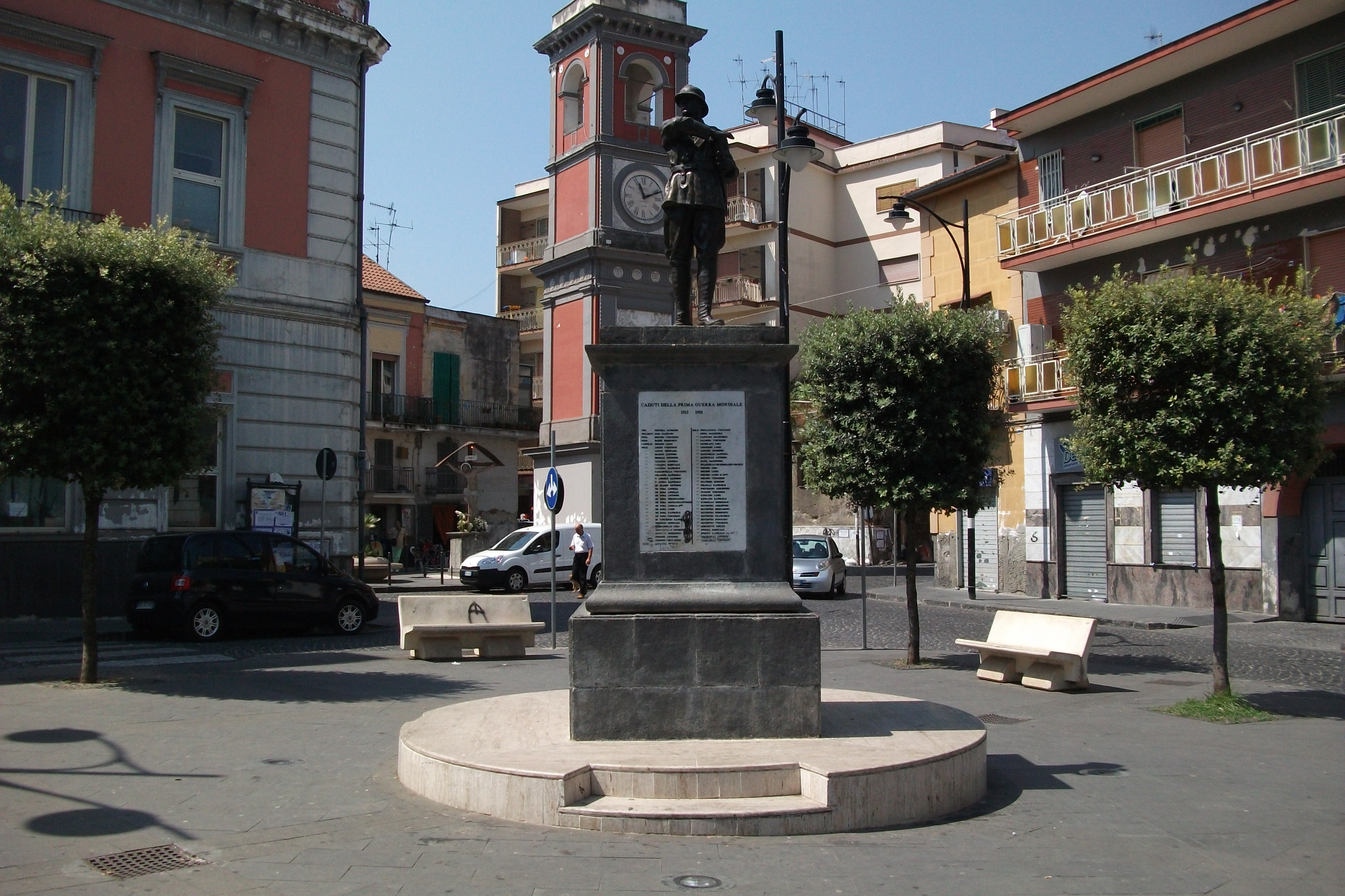 Monumento ai caduti